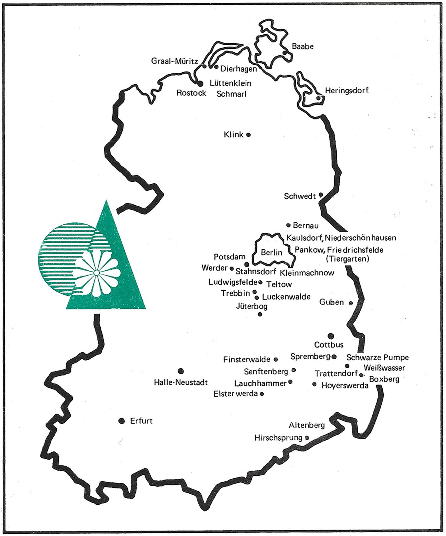 Überregionale Baustellen der GPG Alpina in der DDR